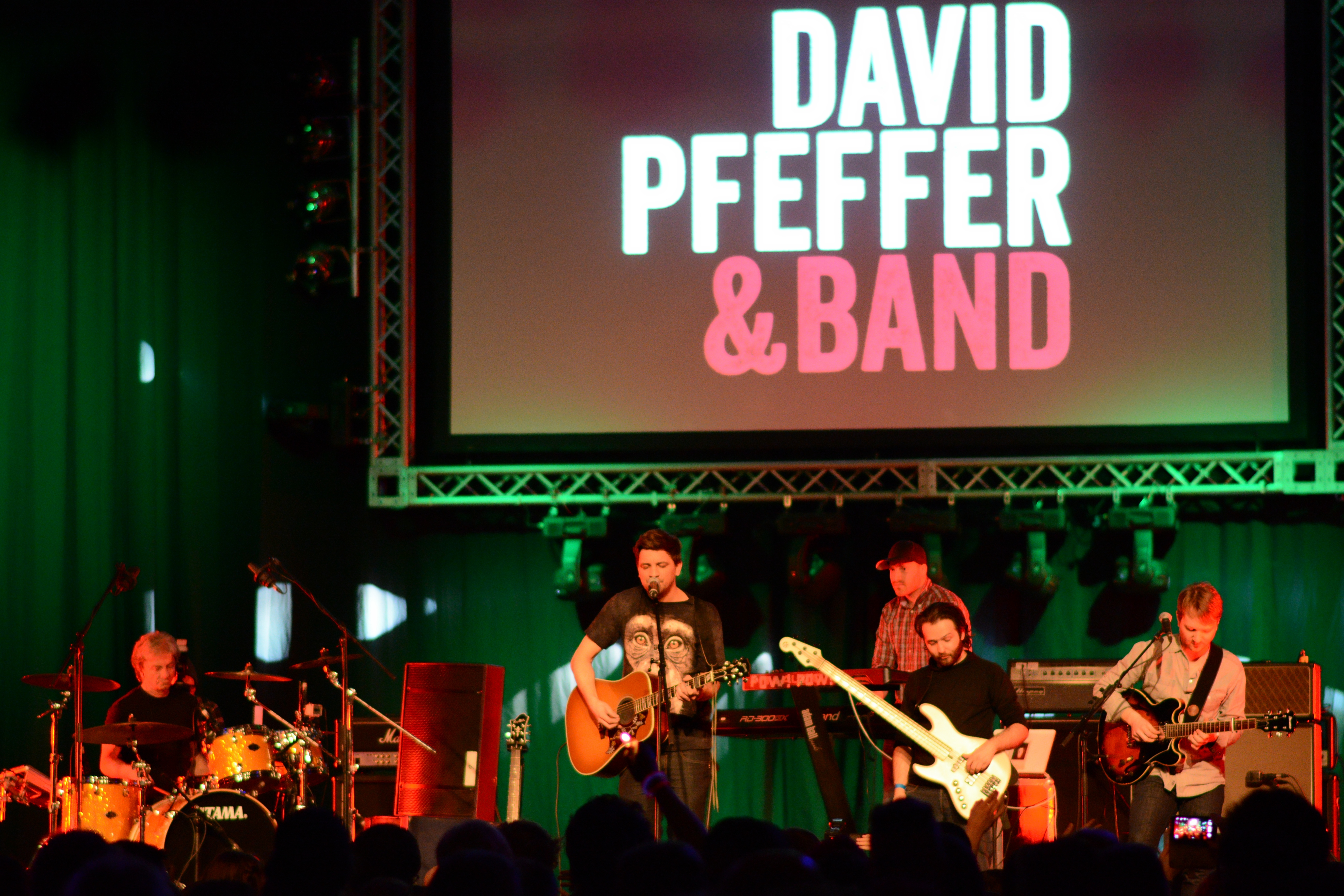 David Pfeffer & Band beim Schüler-Rockfestival 2014.